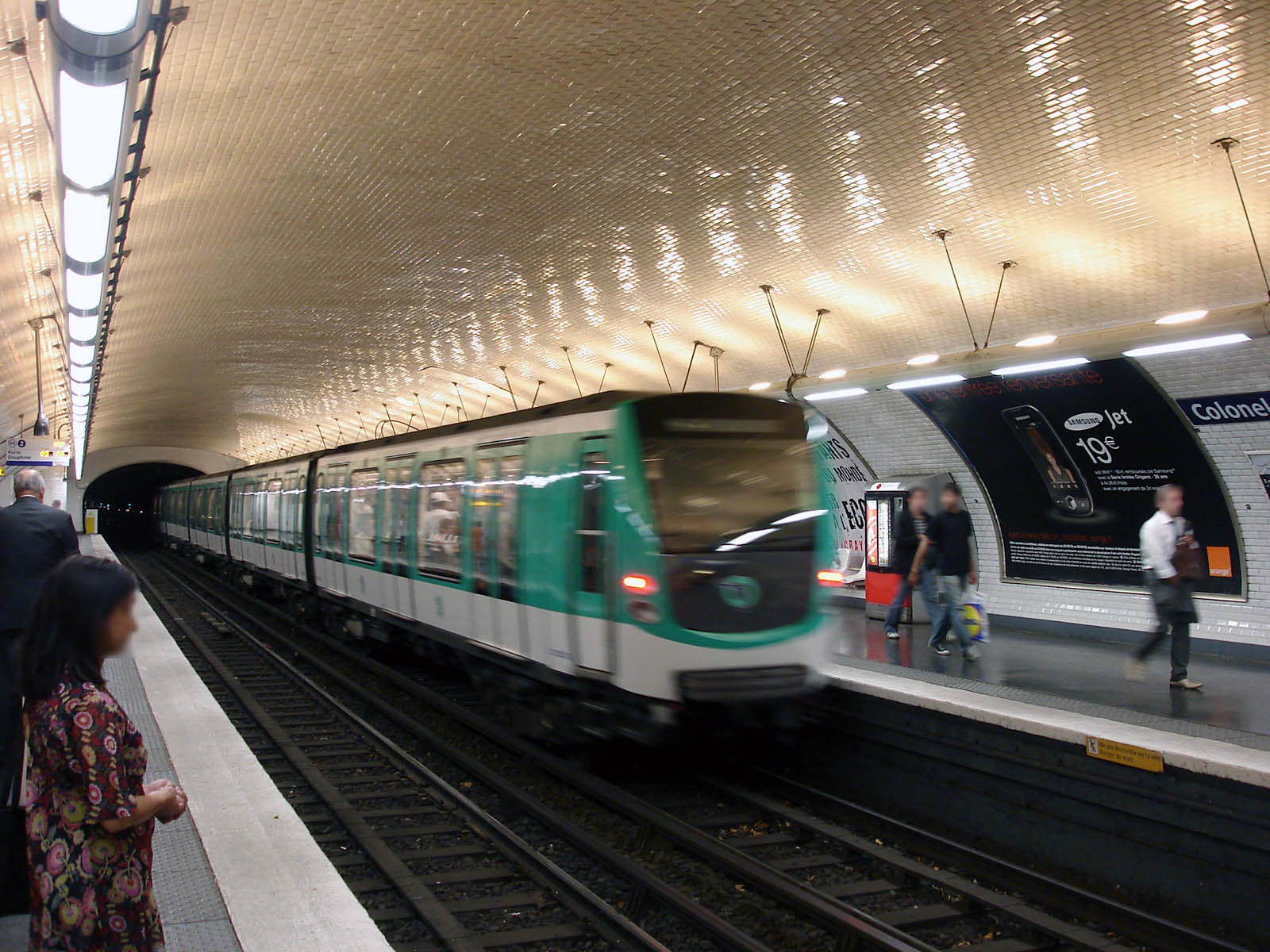 Station Colonel Fabien de la ligne 2 du métro de Paris, France.